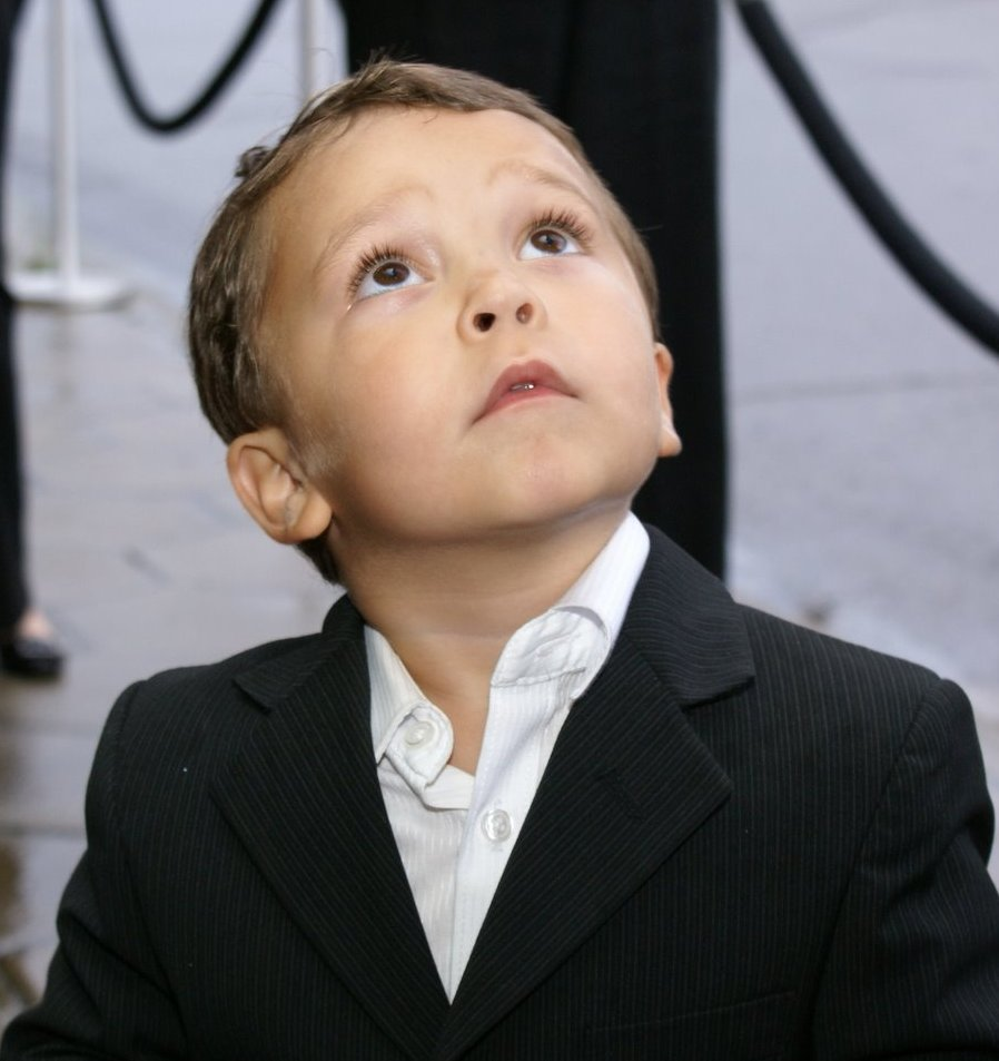 Jack's Movie Premiere-57.JPG